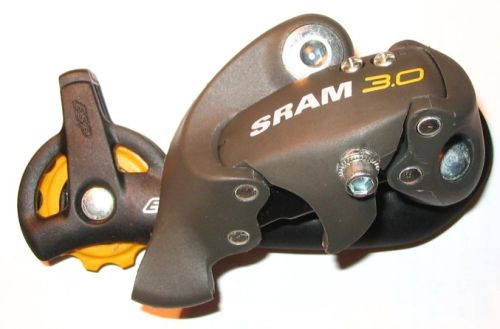 SRAM 3.0 rear derailleur ESP System